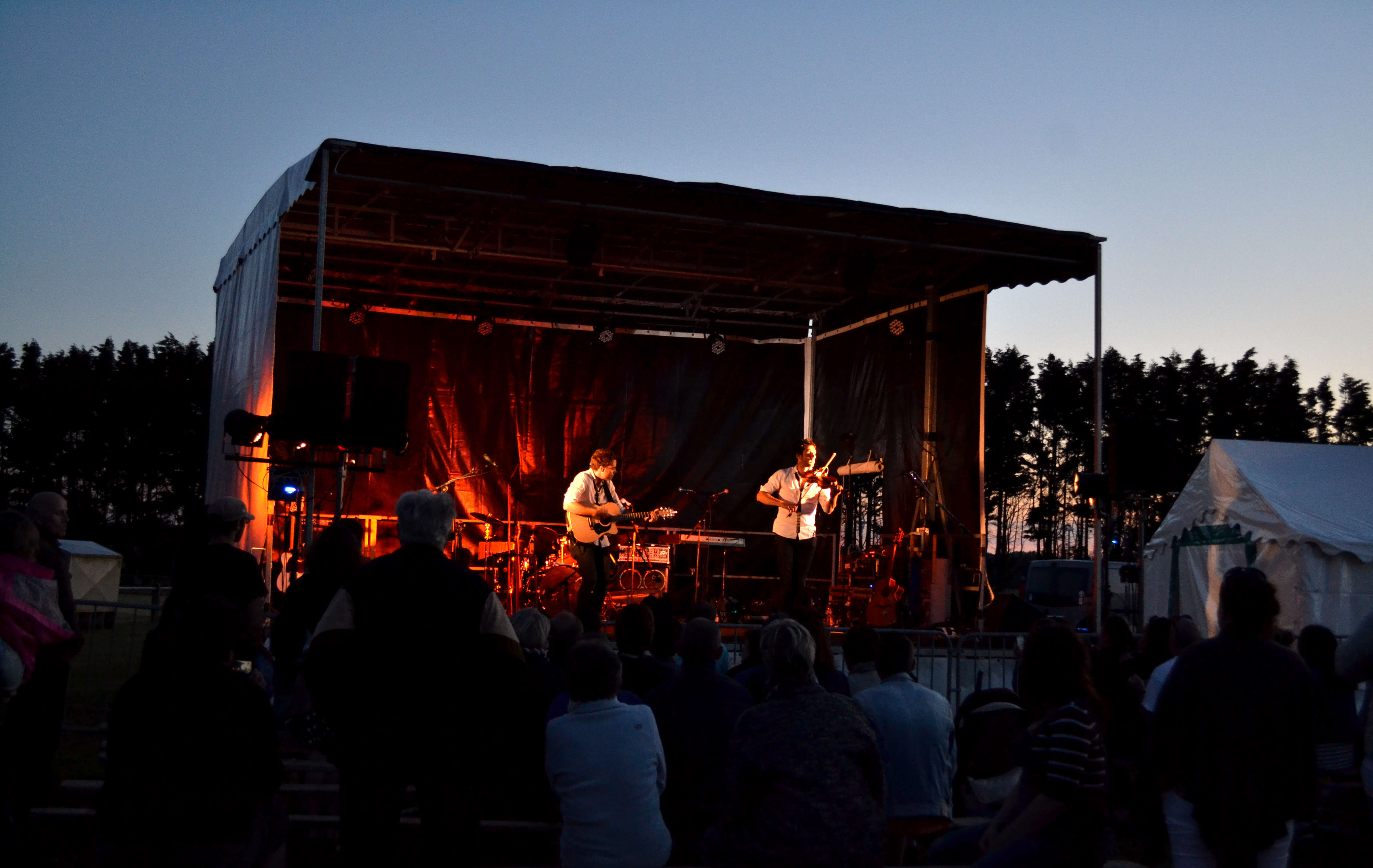 Outside Duo en concert au terrain de sports de Guiler-sur-Goyen organisé par l'association Tud ar Vorc'h le 14 juin 2014.